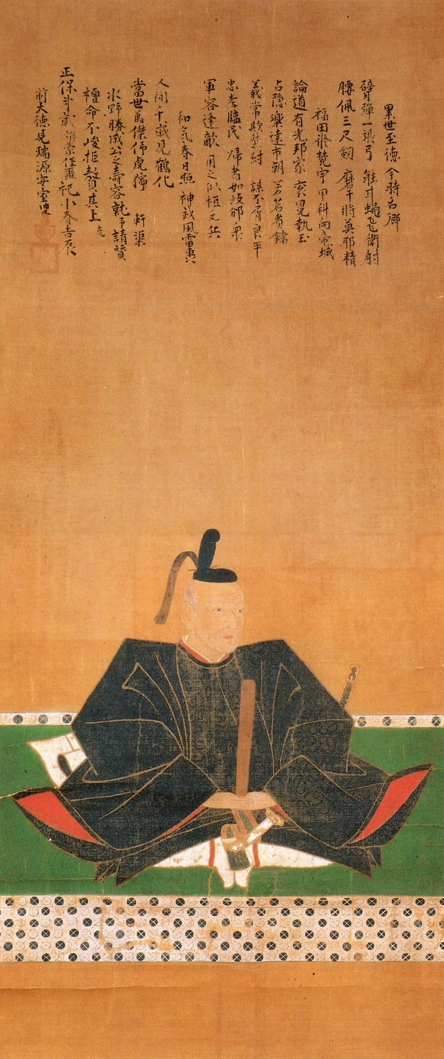 水野勝成の肖像。